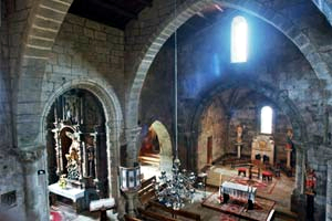 Imagen del interior de la Iglesia Parroquial de Nosa Señoras das Areas de Fisterra